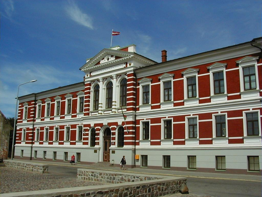 Liepājas pilsētas dome 2000-07-09